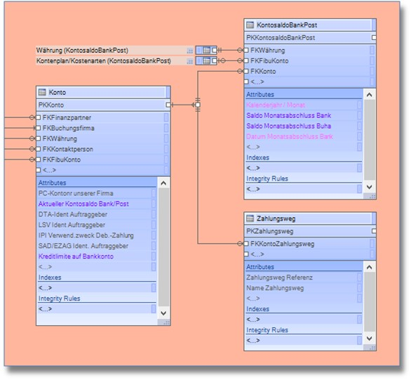 Datenmodell aus Posity